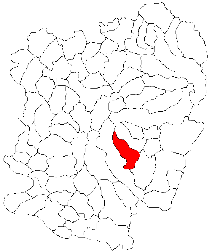 Categorie:Hărţi ale judeţului Caraş-Severin